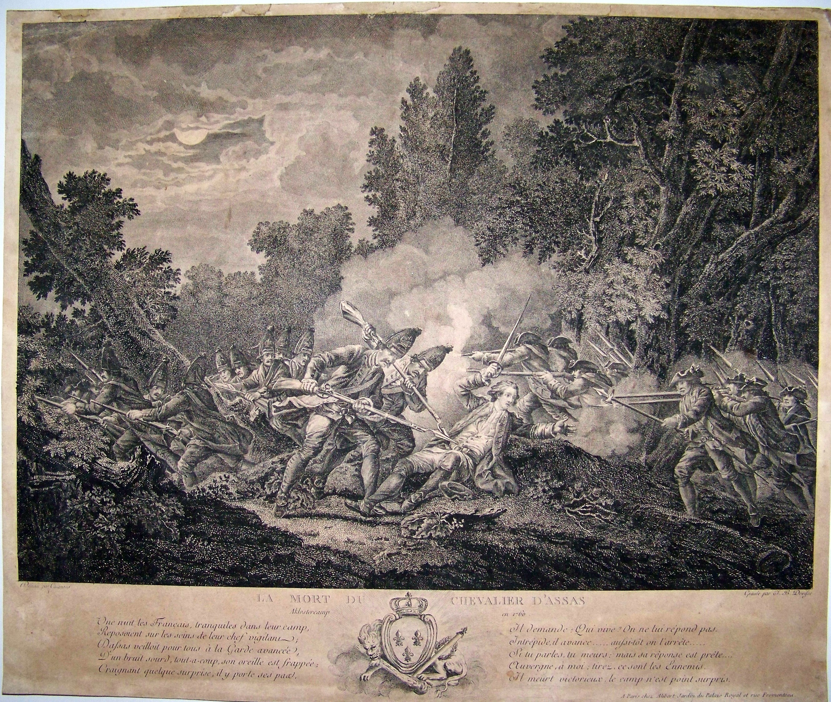 La mort du Chevalier d'Assas à Kloster Kampen en 1760, Dessin de F-J Casanova gravé par Devisse. texte sur le document : LA MORT DU CHEVALIER D'ASSAS Aklestercamp en 1760 "Une nuit les Français, tranquiles dans leur camp, Reposent sur les soins de leur chef vigilant; Dafsas veilloit pour tous à la Garde avancée, D'un bruit sourd, tout-a-coup, son oreille est frappée : Craignant quelque surprise, il y porte ses pas . Il demande : Qui vive ? On ne lui répond pas . Intrépide, il avance...afsi-tôt on l'arête...Si tu parle, tu meurs : mais sa réponse est prête...Auvergne, à moi ; tirez, ce sont les Ennemis . Il meurt victorieux, le camp n'est point surpris ." A Paris chez Alibert Jardin du Palais Royal et rue Fromenteau. Dessin par F-J Casanova Gravé par J.B Devifse.